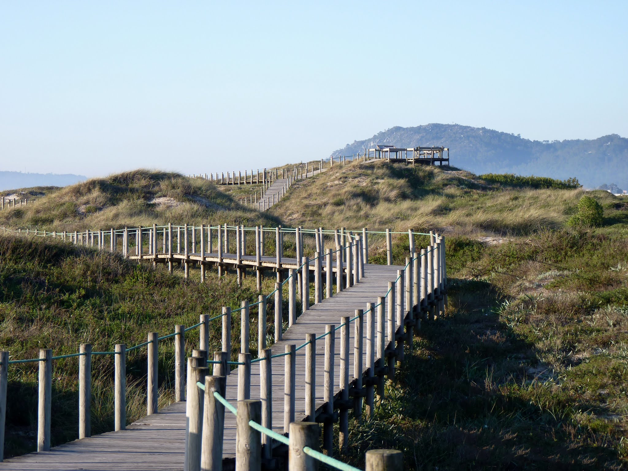 Ofir, passadiços